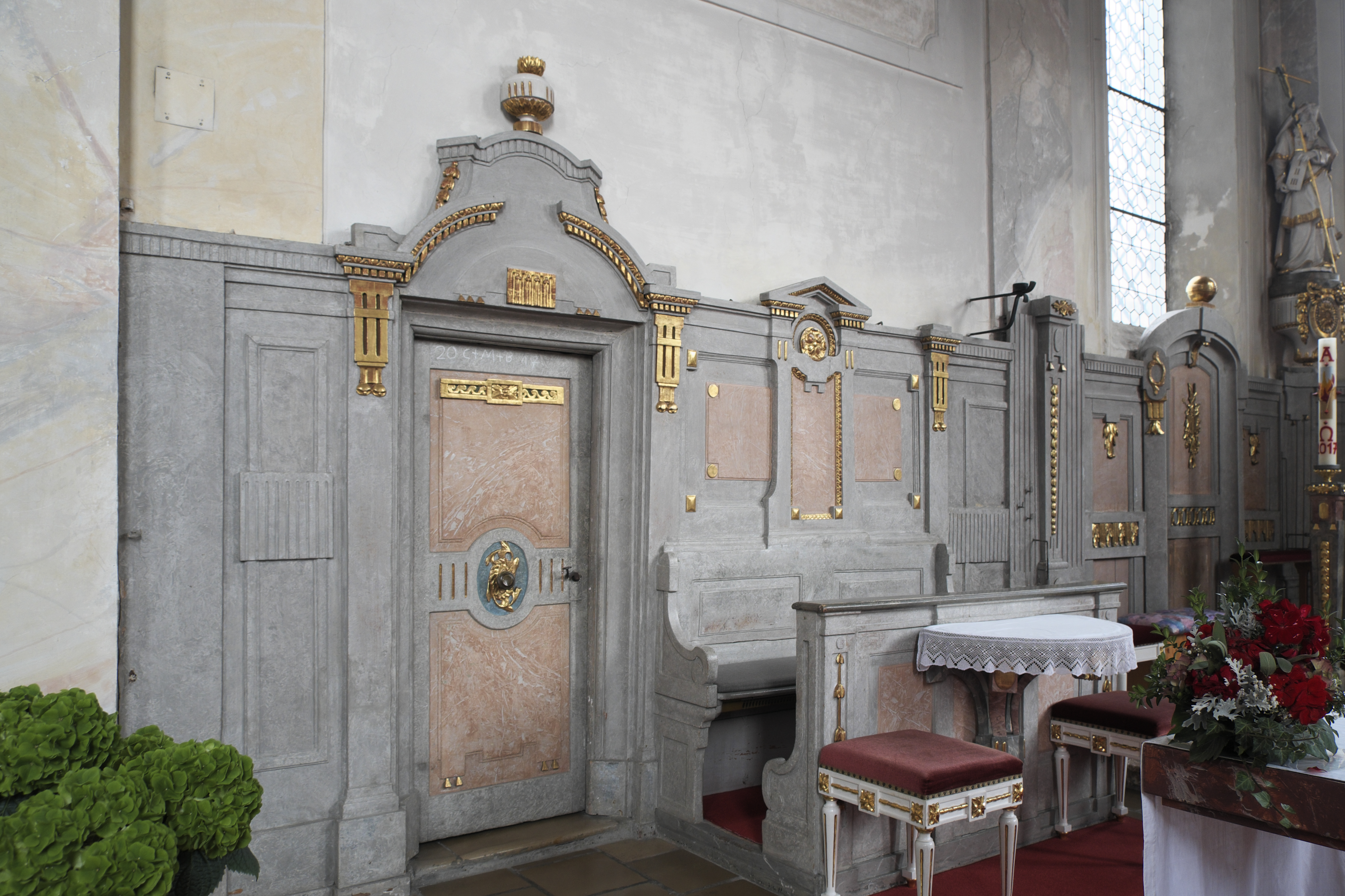 Katholische Pfarrkirche St. Johann Baptist in Asch (Fuchstal) im Landkreis Landsberg am Lech (Bayern/Deutschland), Holzvertäfelung im Chor